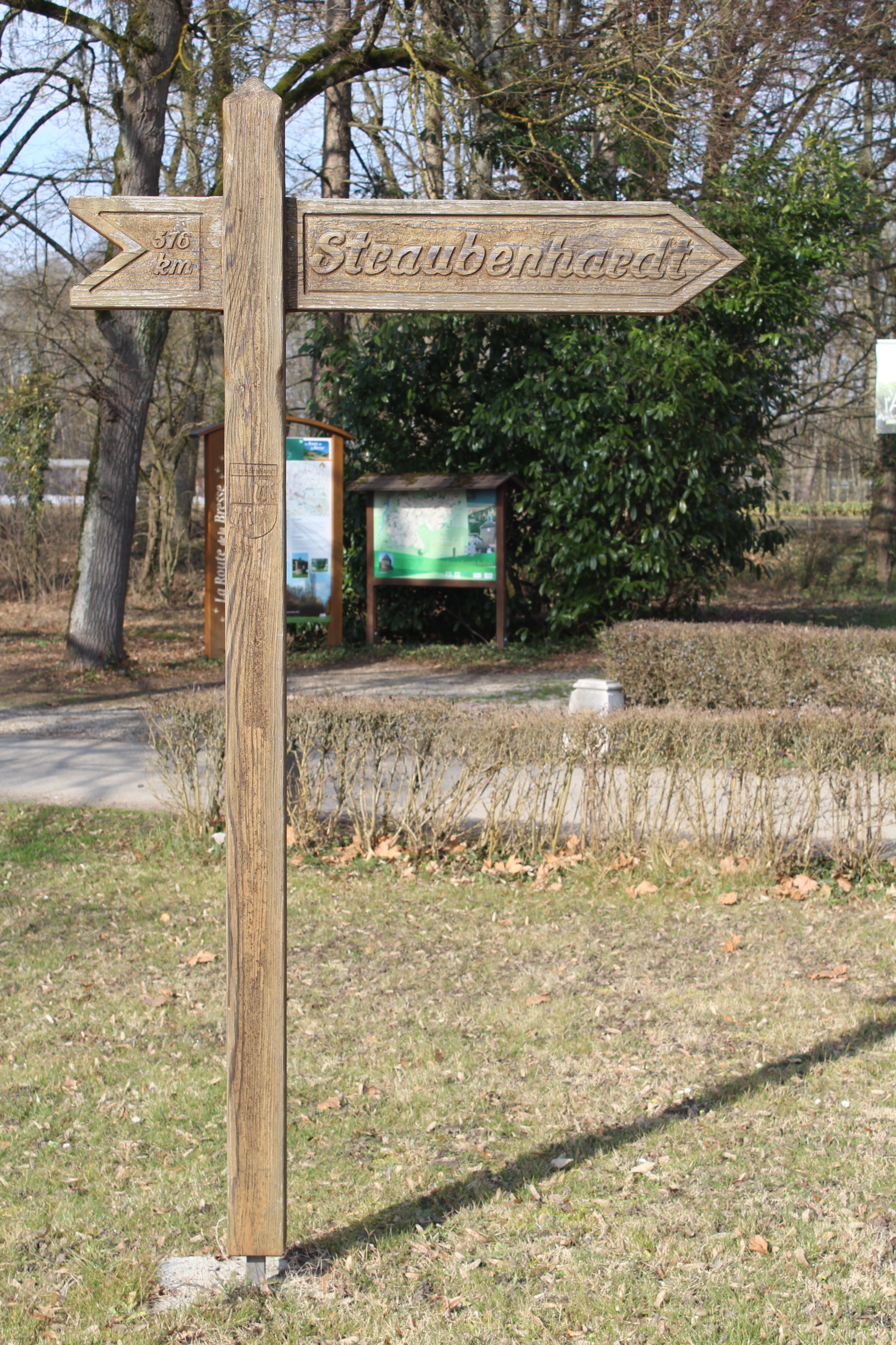 Panneau indiquant le distance et la direction pour aller à Straubenhardt depuis Pont-de-Veyle.